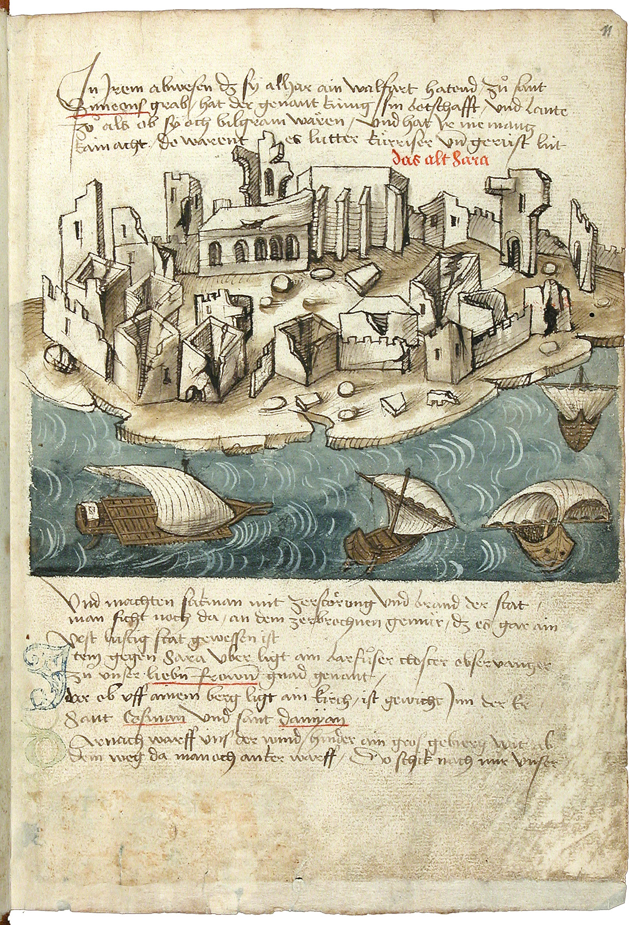 Schilderung einer Pilgerreise von Konstanz nach Jerusalem durch Konrad von Grünenberg, um 1487 Konrad von Grünenberg: Beschreibung der Reise von Konstanz nach Jerusalem - Cod. St. Peter, pap. 32. Handschrift, Bodenseegebiet (Konstanz?), um 1487. II + 53 Blätter, 32x21, mit 31 kolorierten Zeichnungen der Reiseroute von Venedig bis Palästina. Text in alemannischer Mundart.